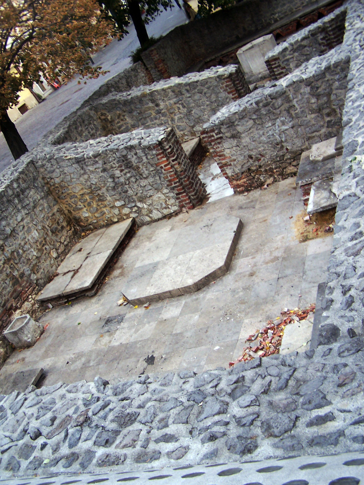 volt török fürdő (Pécs, Ferencesek utcája (volt Sallai u.))